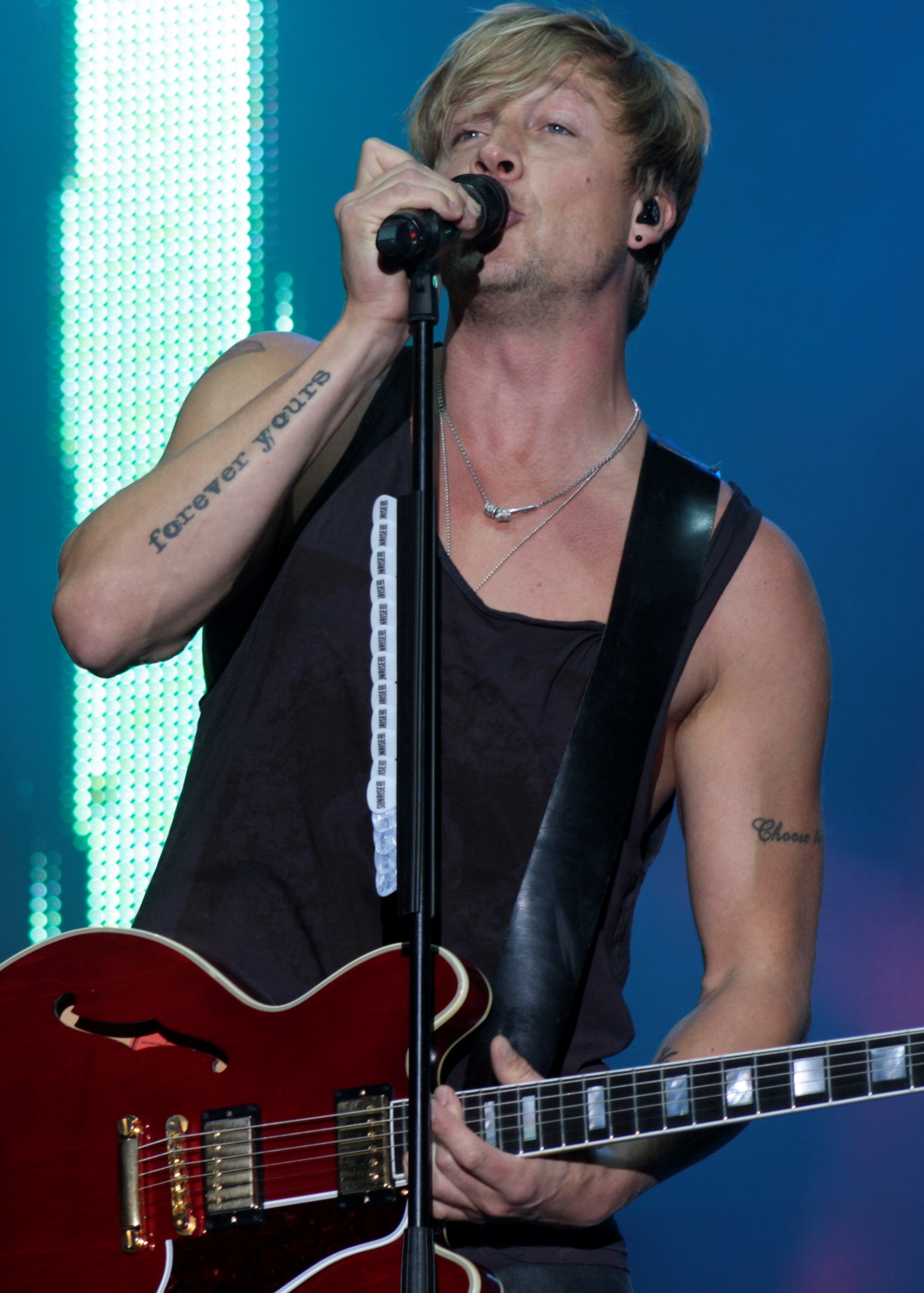 Sunrise Avenue Frontman Samu Haber bei einem Auftritt in Wolfenbüttel im August 2014.